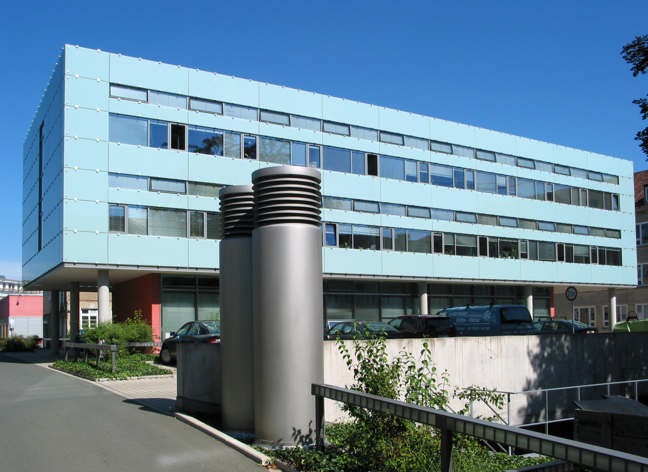 Bauhaus-Universität Weimar - Neubau Coudraystraße 11c der Fakultät Bauingenieurwesen, fertiggestellt im Frühjahr 2003. In dem Glasbau sind die Professuren Grundbau, Bodenmechanik sowie das Lehrgebiet der Geologie untergebracht.